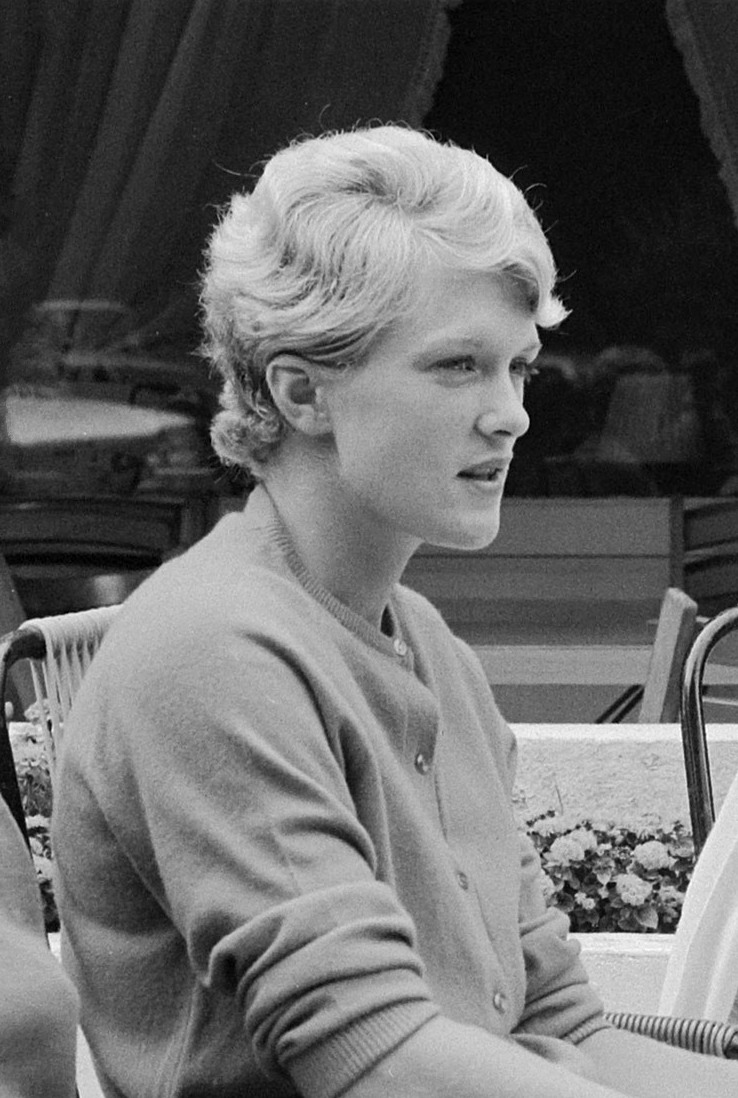 Tennis in Hilversum in het restaurant, Robbin Ebbern